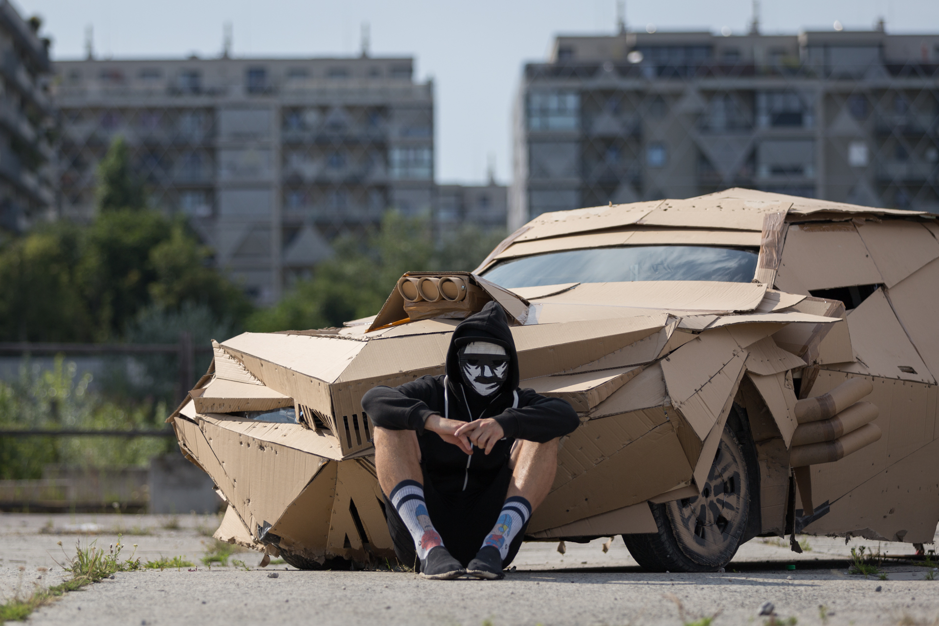 Golif - Der Beobachter Auto